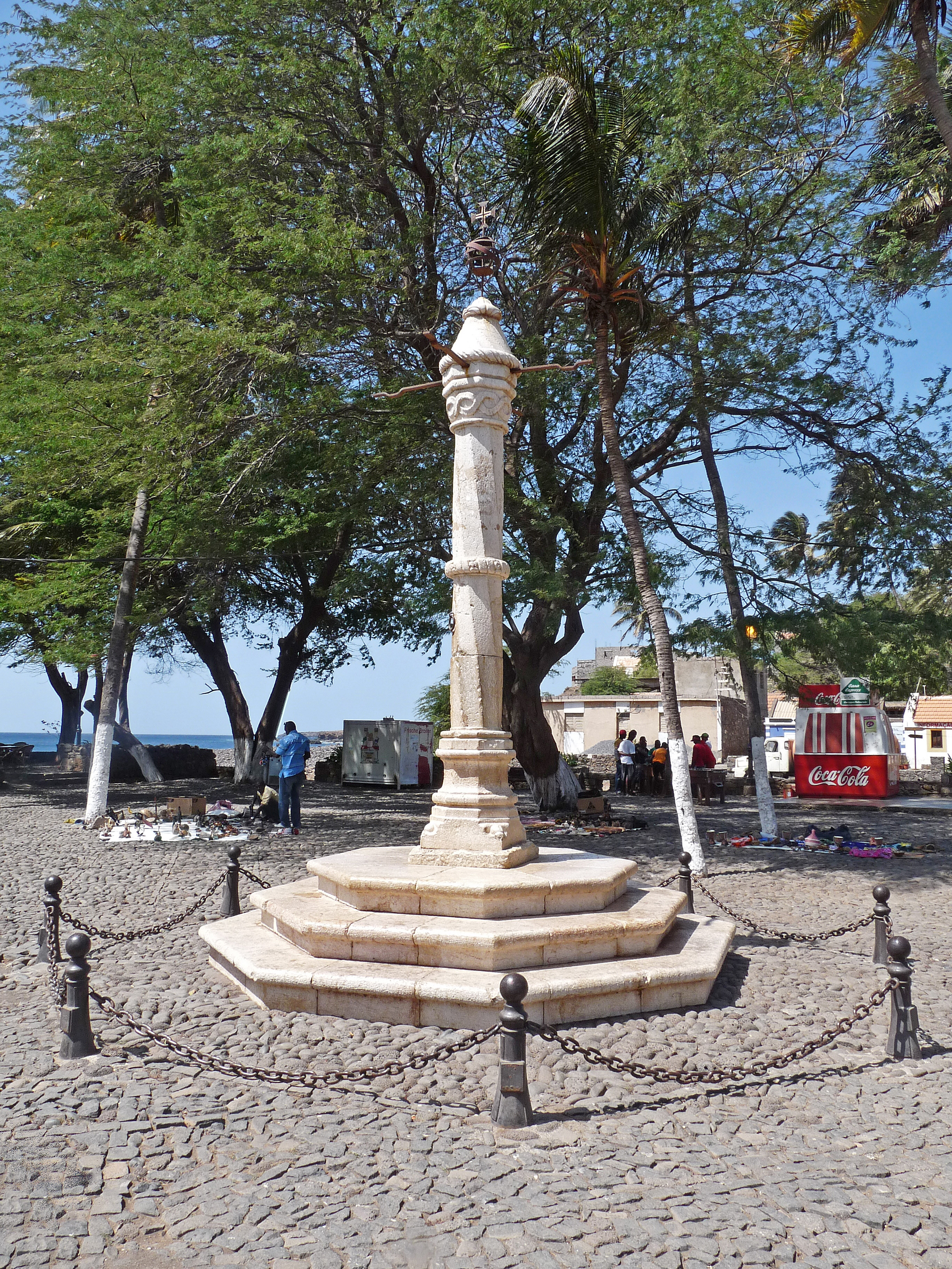 Cidade Velha (île de Santiago, Cap-Vert) : pelourinho (pilori)